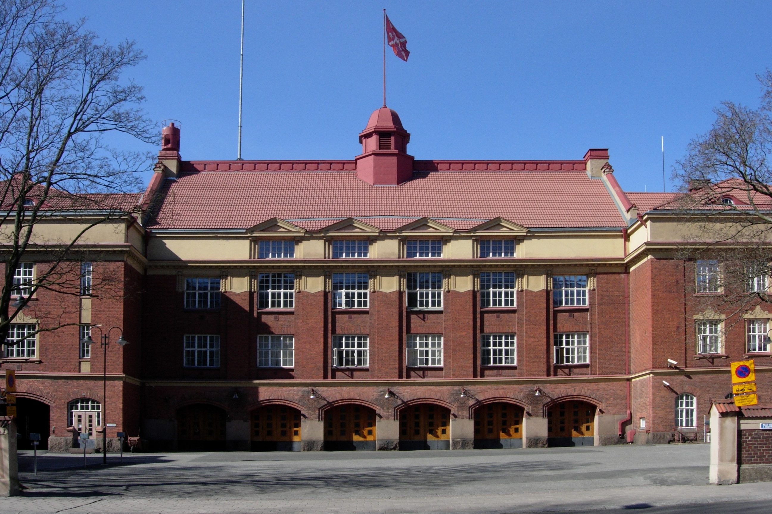 Turun paloasema